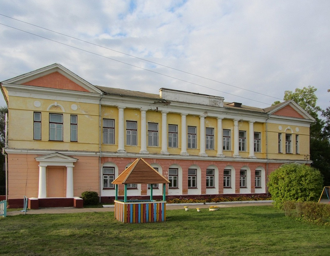 Германавічы.